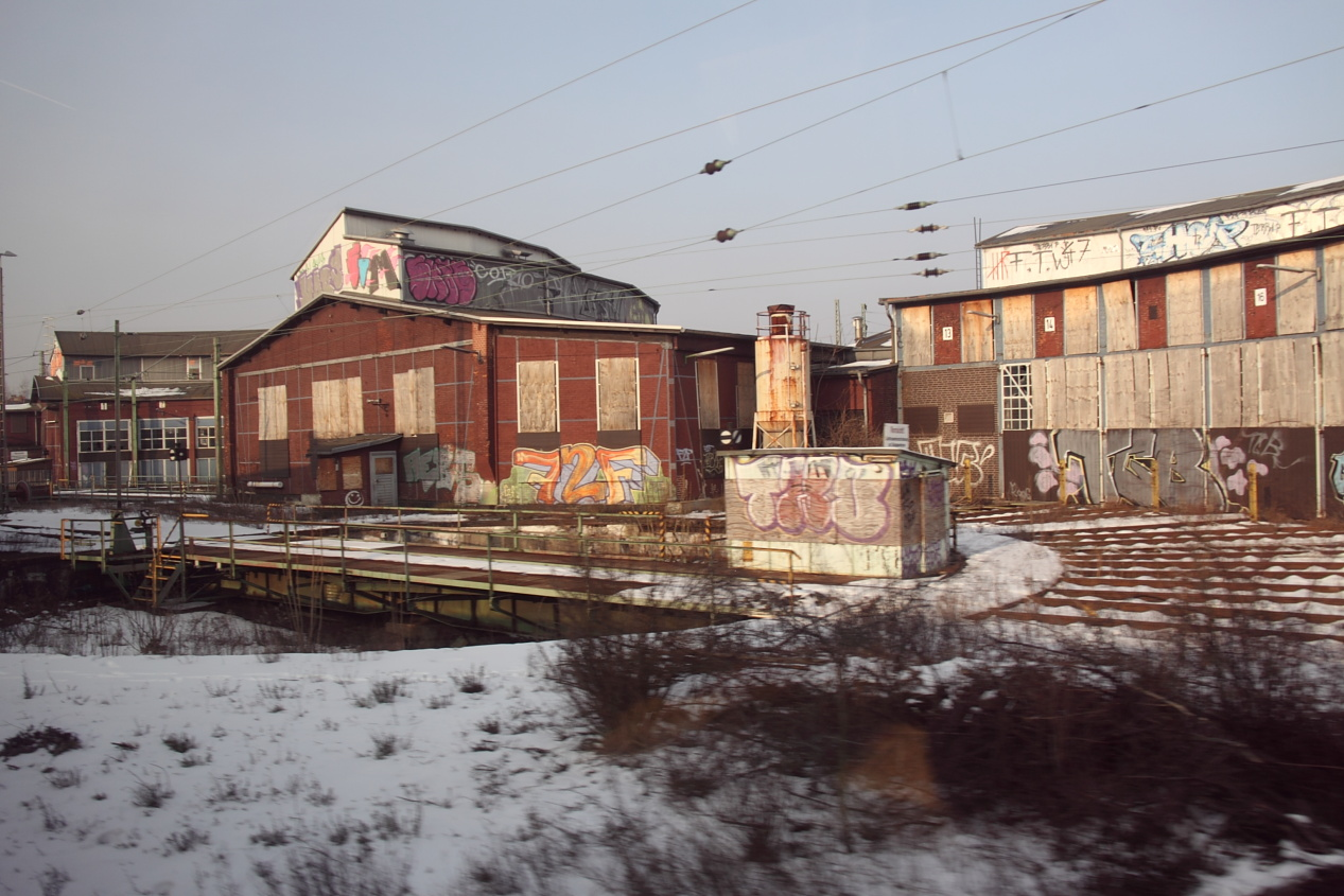 Bahnbetriebswerk Hannover Ostschuppen Rundschuppen mit Drehscheibe